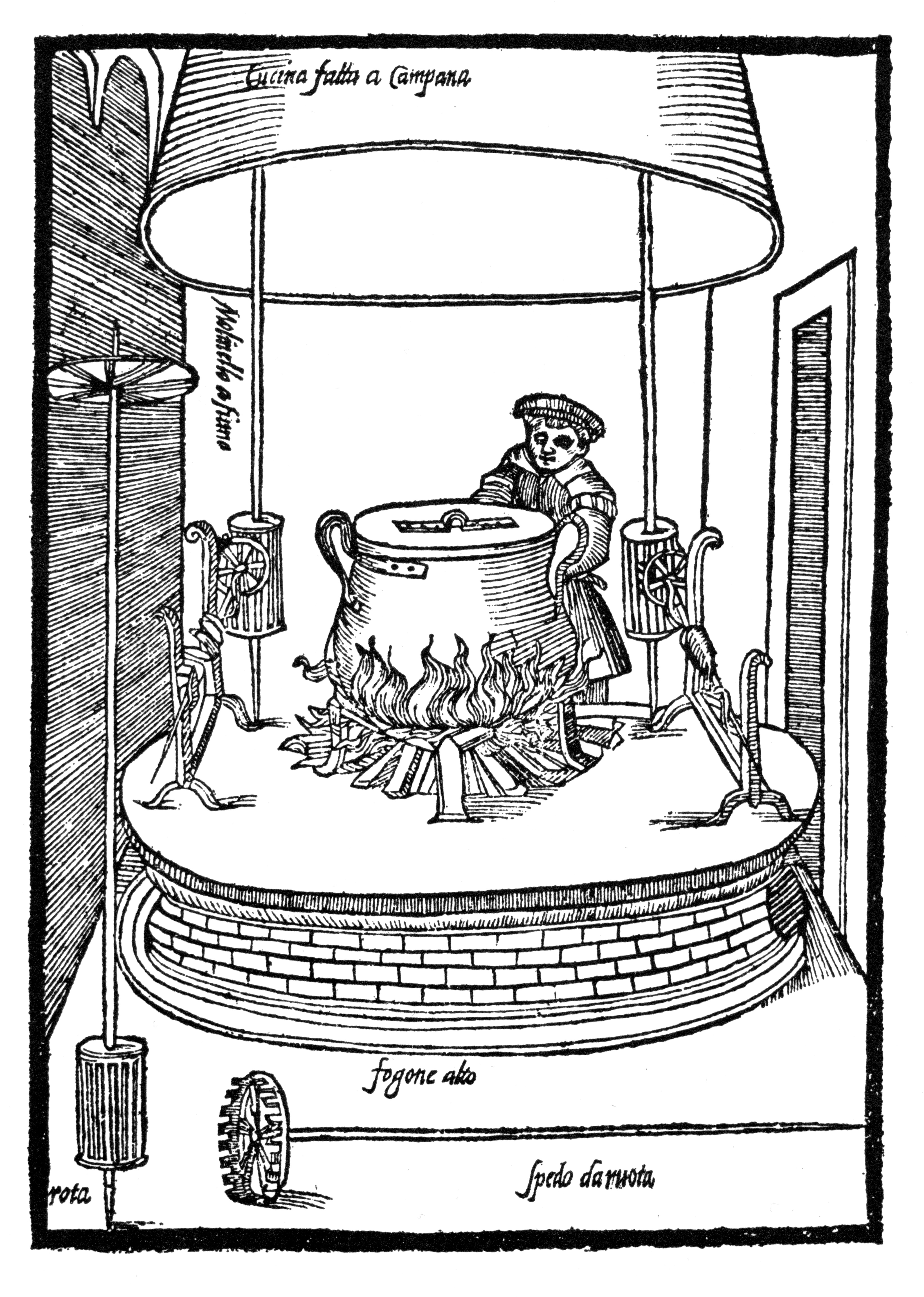 Ländliche Küche mit heißluftbetriebenen Drehspießen